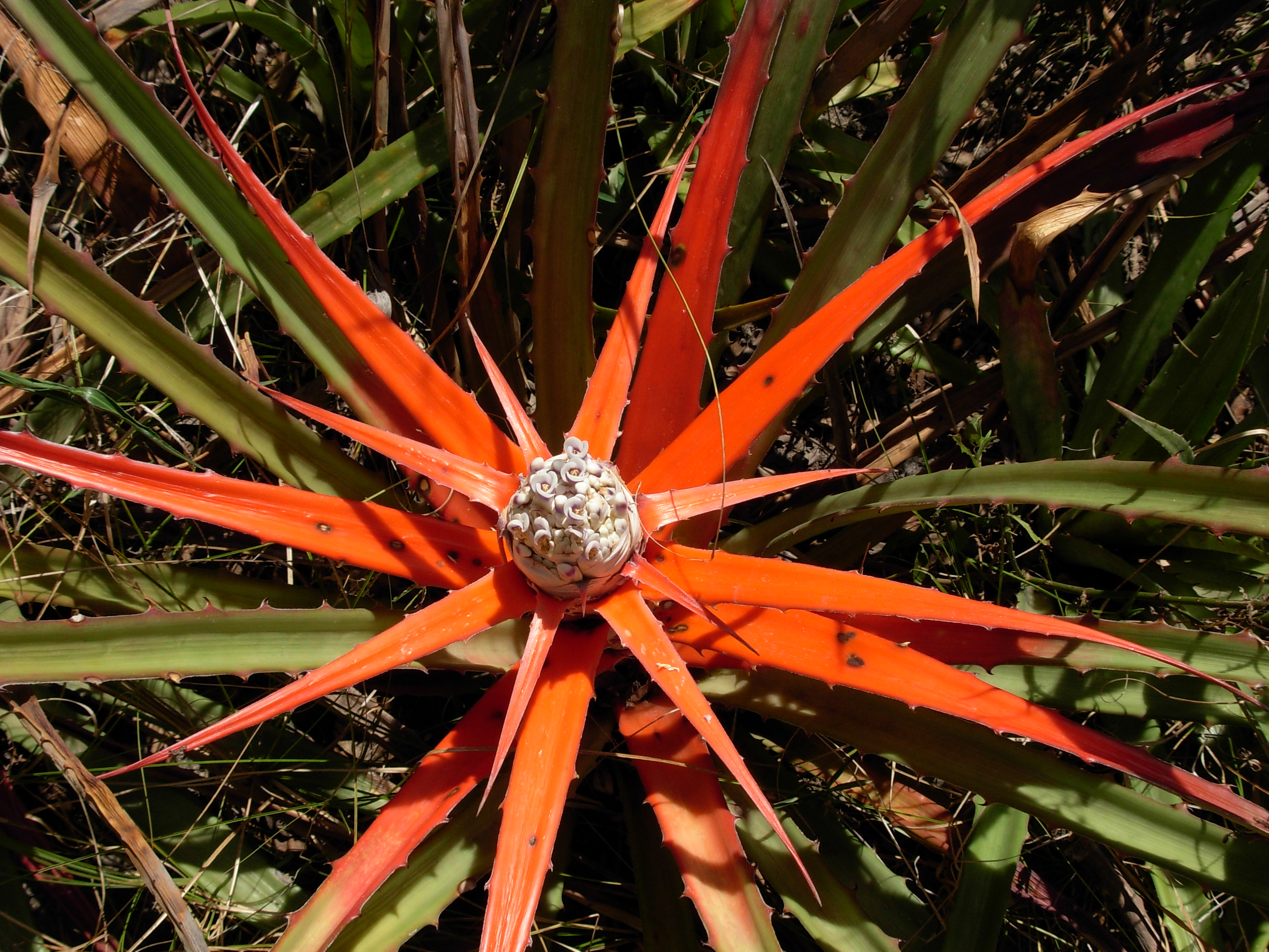 Bromelia serra en floración